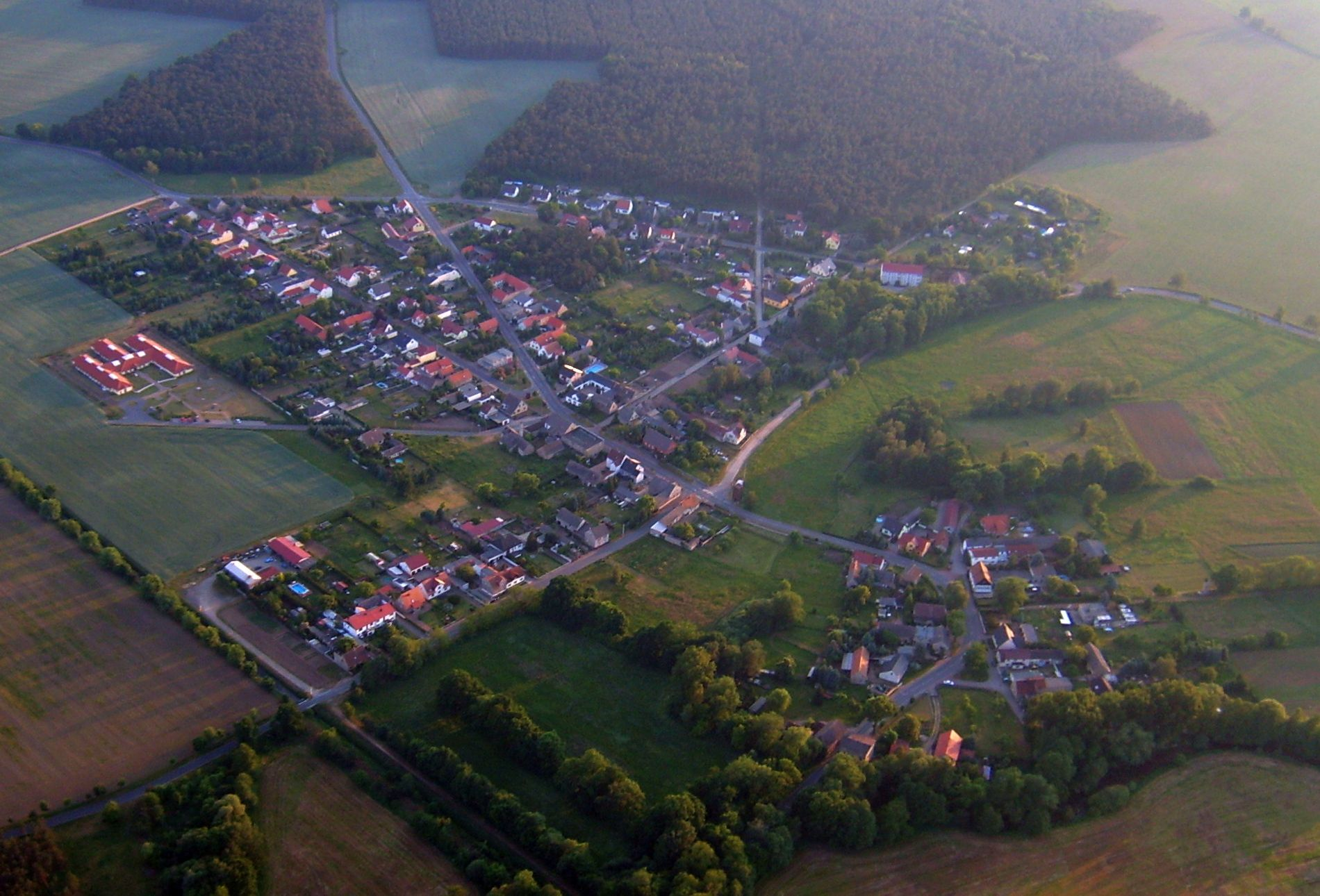 Prieschka aus der Luft.